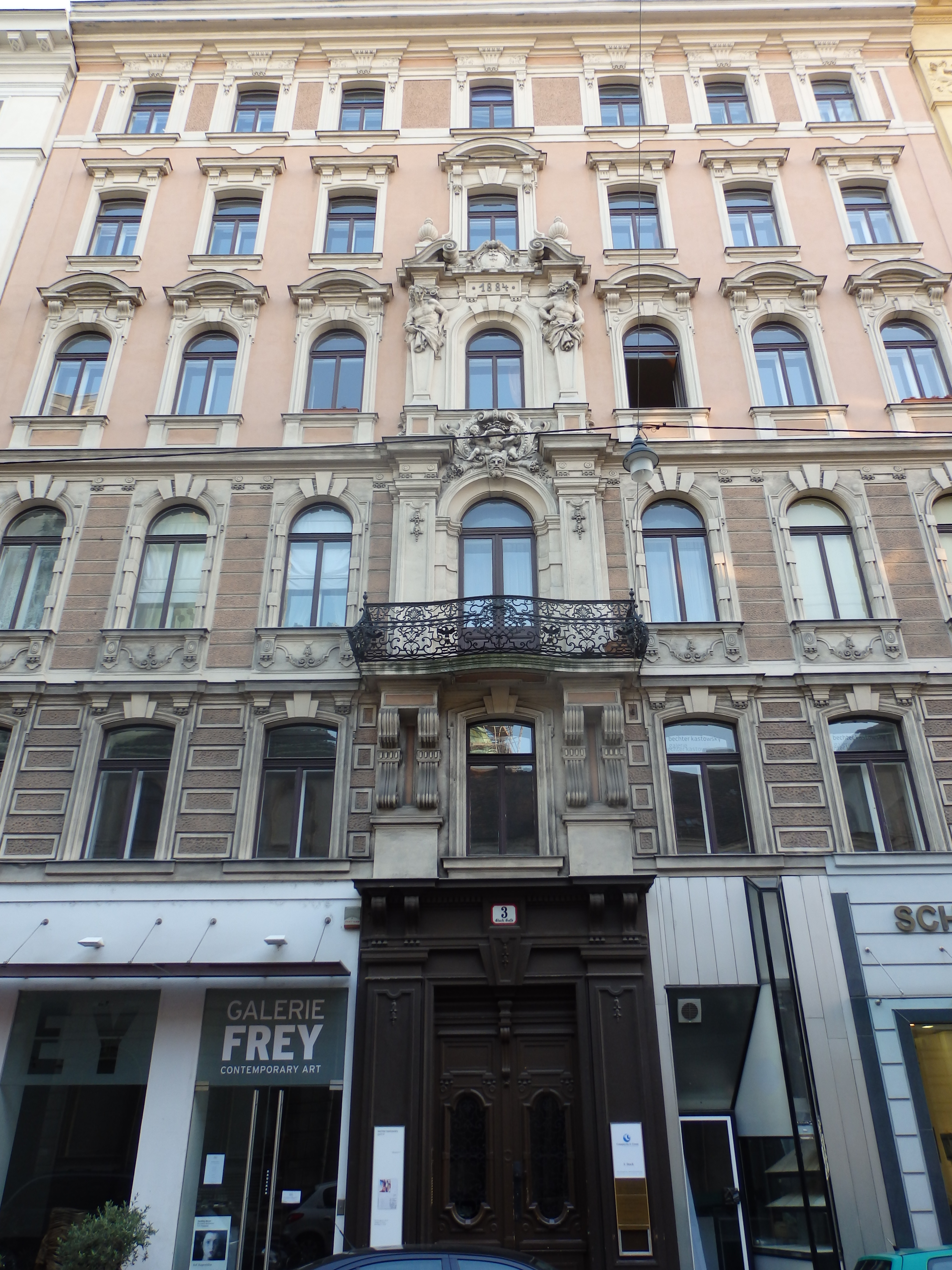 Wohnhaus (1884) von Josef Hudetz, Gluckgasse 3, Wien-Innere Stadt